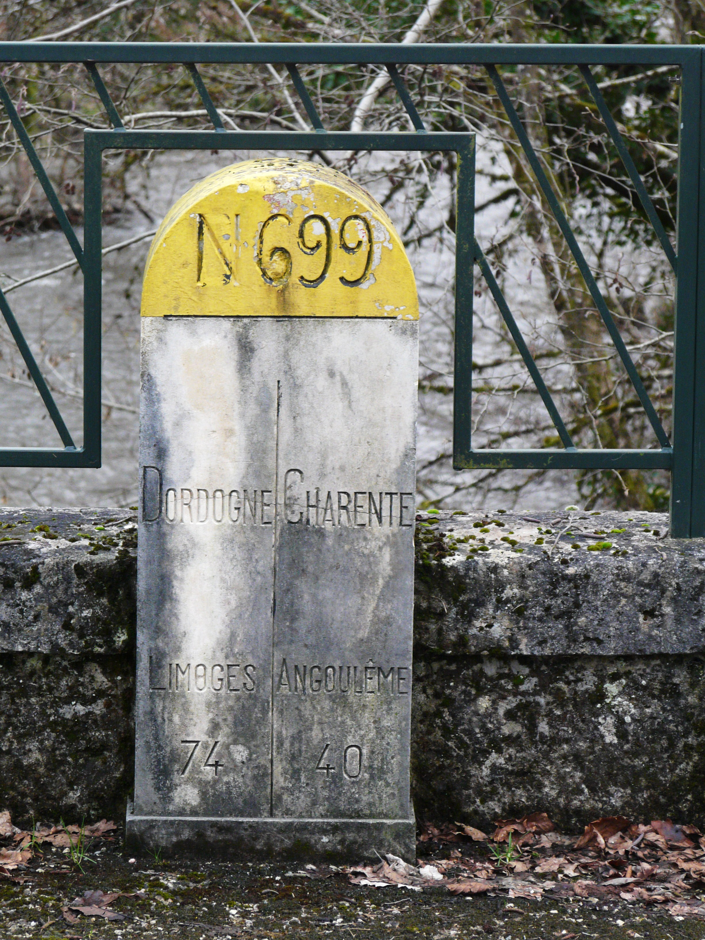 Borne de limite départementale entre Busserolles (Dordogne) et Écuras (Charente) sur la route départementale 699 (ancienne route nationale 699).